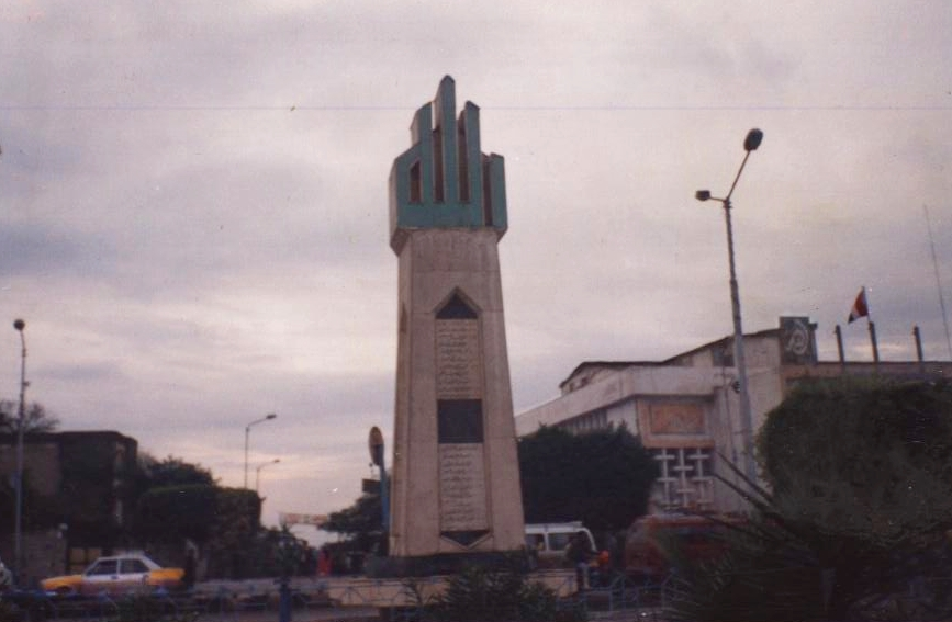 النصب التذكاري لشهداء مدينة دسوق في حرب أكتوبر عام 1973.